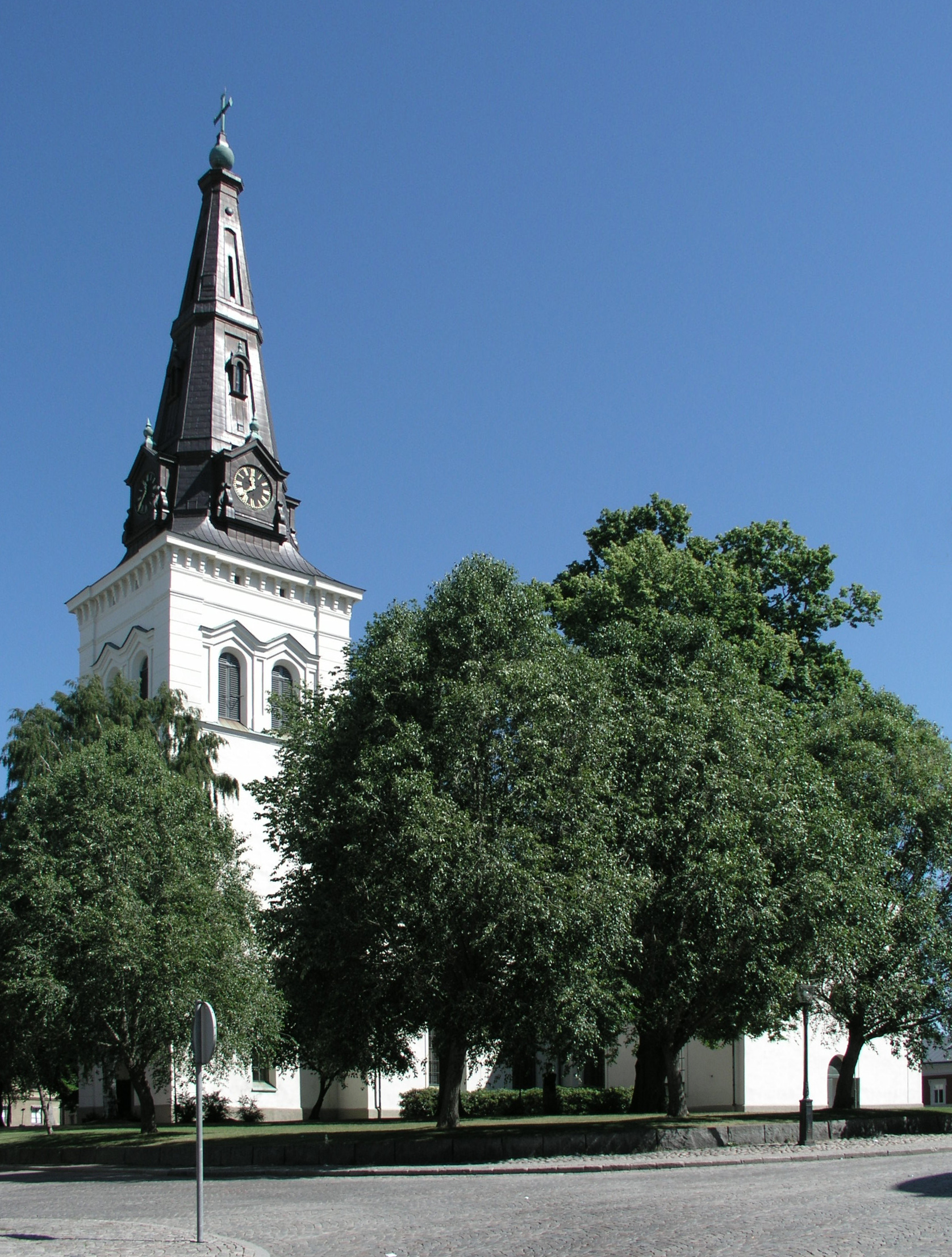 Karlstads domkyrka / Cathedral of Karlstad. View.